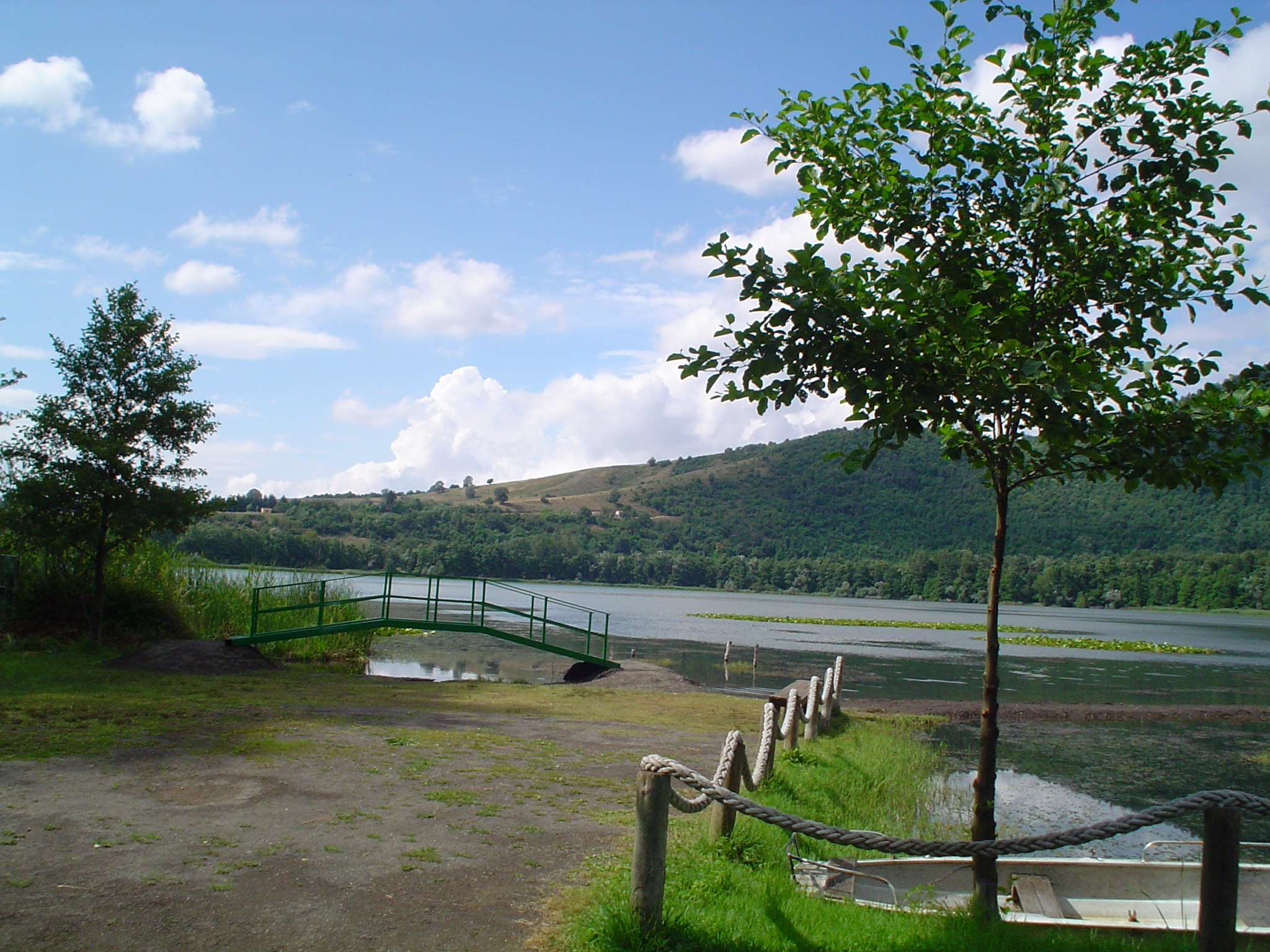 Lago Grande - Monticchio Laghi